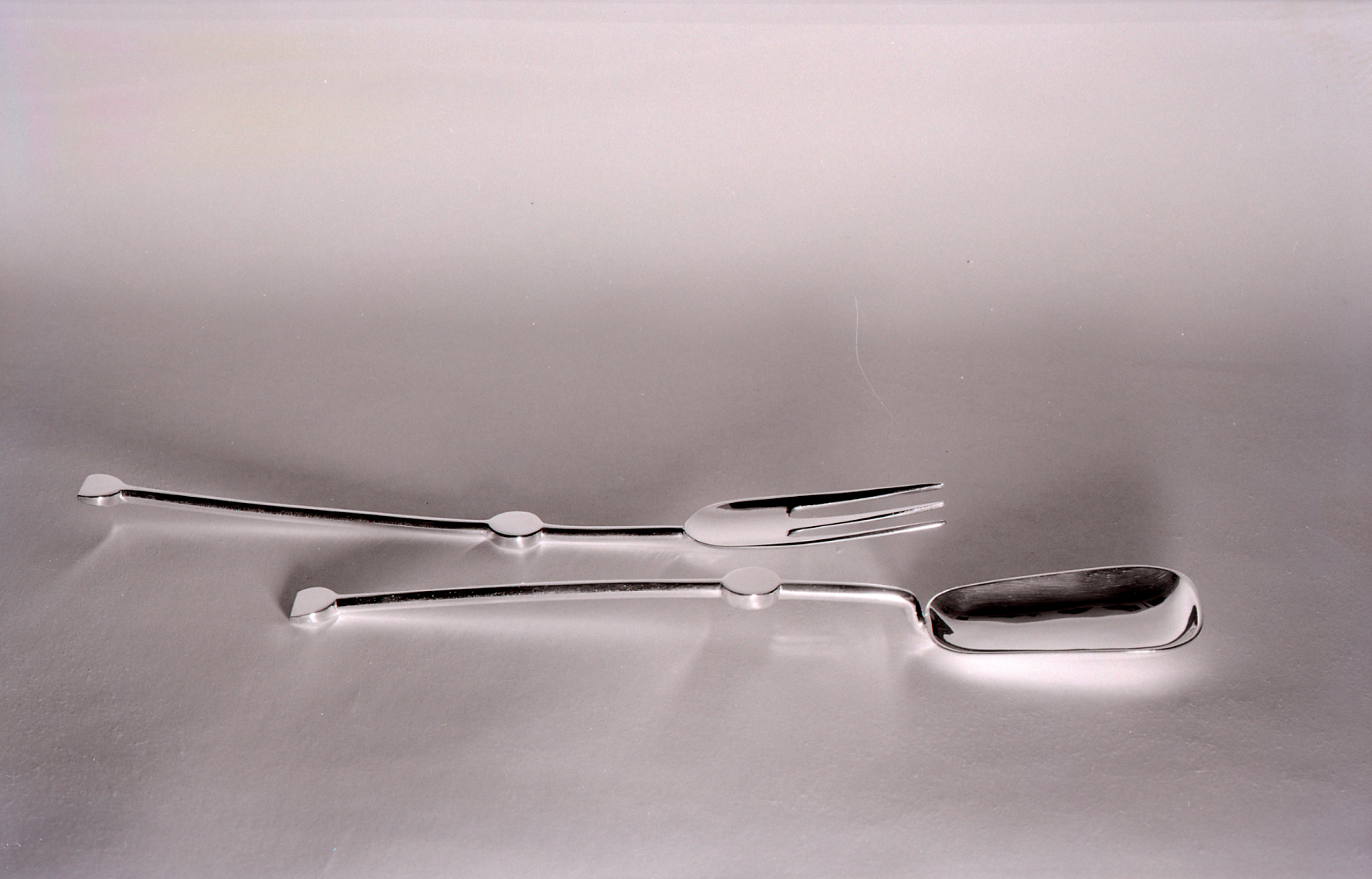 Servizio fotografico : Italia, 1963 / Paolo Monti. - Buste: 3, Fototipi: 6 : Negativo b/n, gelatina bromuro d'argento/ pellicola ; 6x9. - ((Serie costituita da 8 negativi identificati con la numerazione: 23721-23728. Sulla busta R23721 manoscritto: "Steiner/ Aterni". Numerazione parallela: 9-15. La suddetta serie è contenuta nella scatola identificata con la numerazione 23214/23808. Sulla scatola manoscritto con pennarello nero: "Design e arte moderna". - , presso Archivio Paolo Monti. - Fonte: Rubrica di Paolo Monti: Archivio 10x12 (ultimi numerati) - dal G1 al (s.d.)